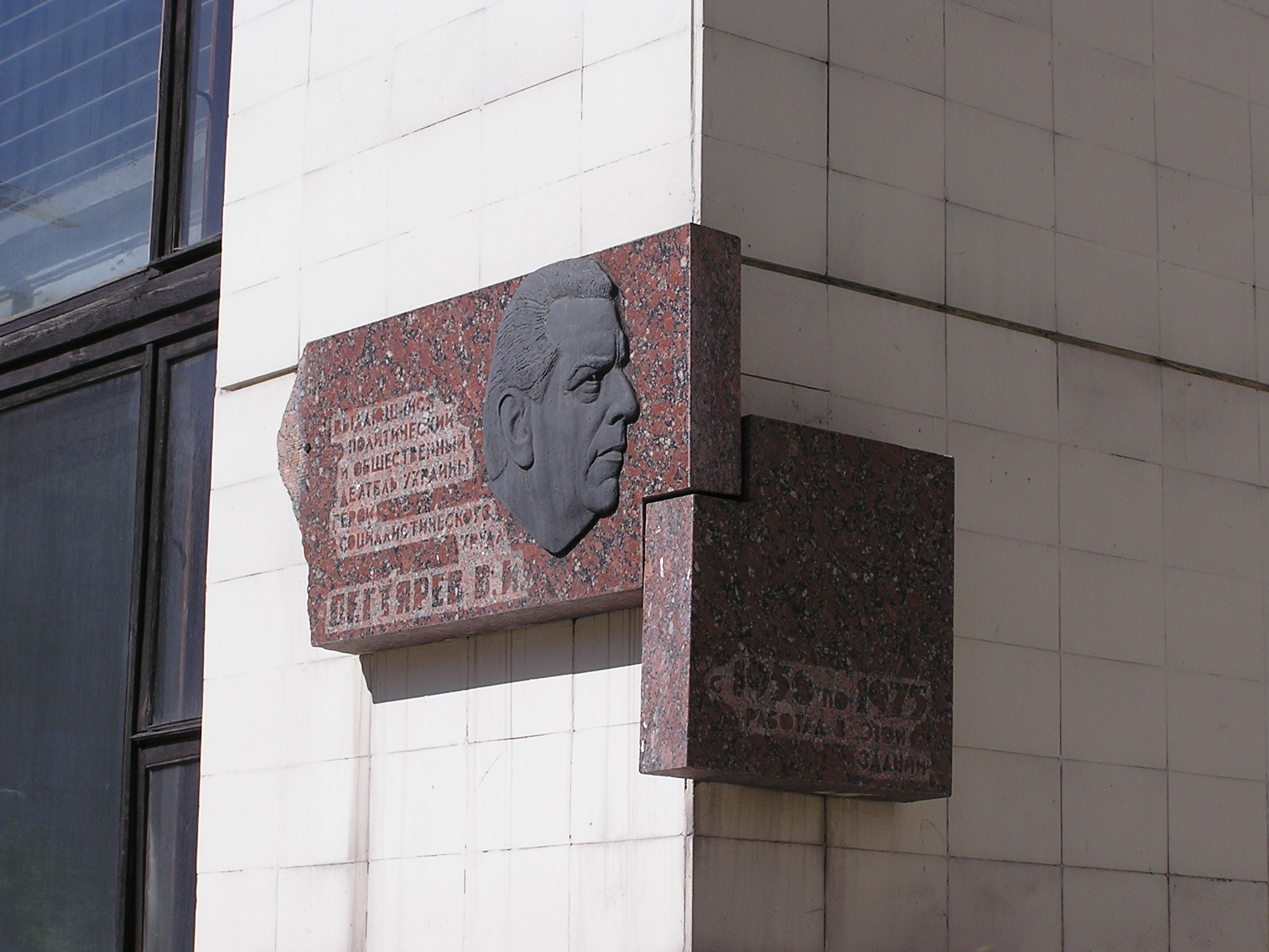 Мемориальная табличка на здании Ворошиловского исполкома в честь Владимира Ивановича Дегтярёва